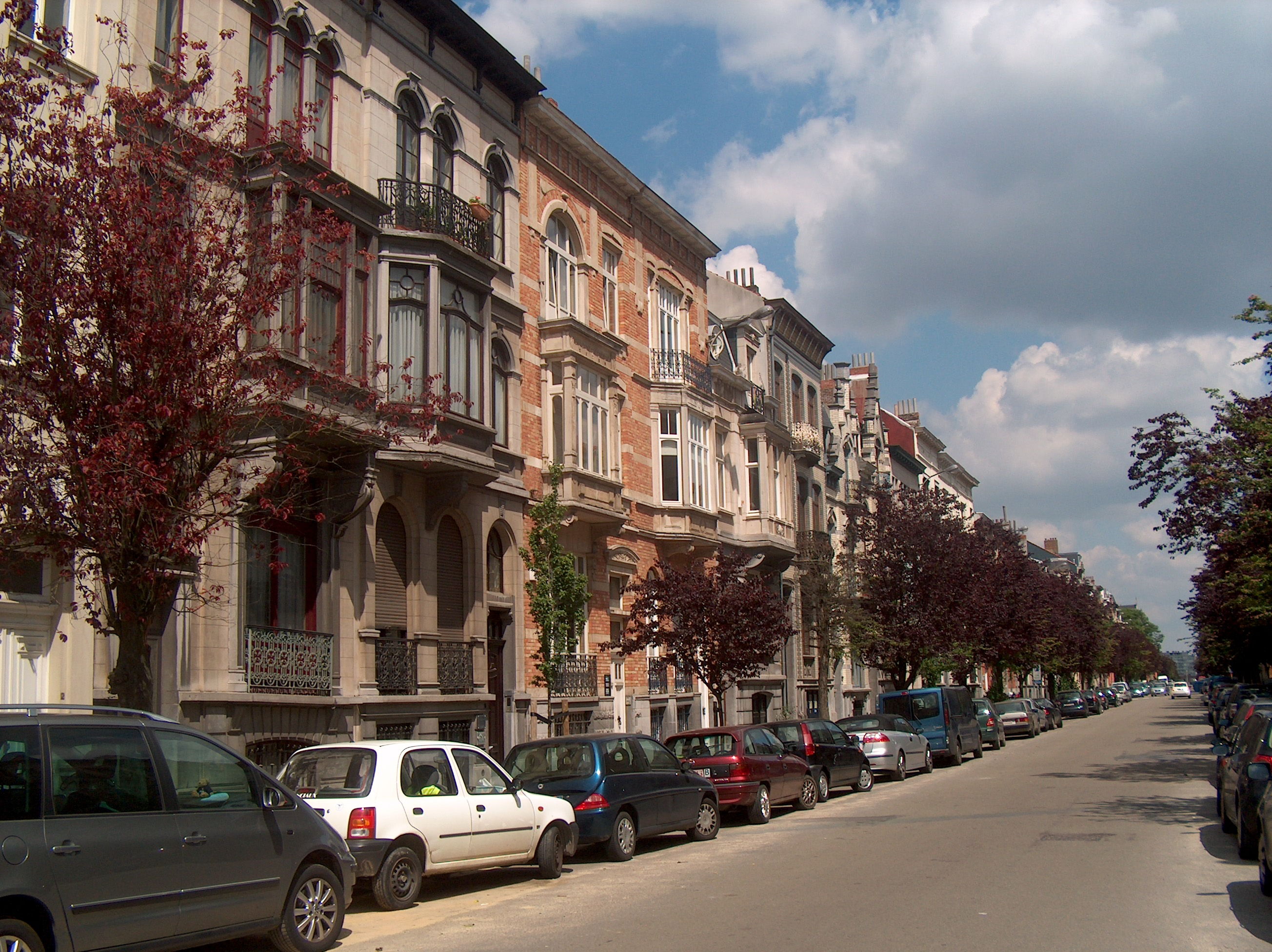 L'avenue Milcamps à Schaerbeek, Bruxelles, Belgique.